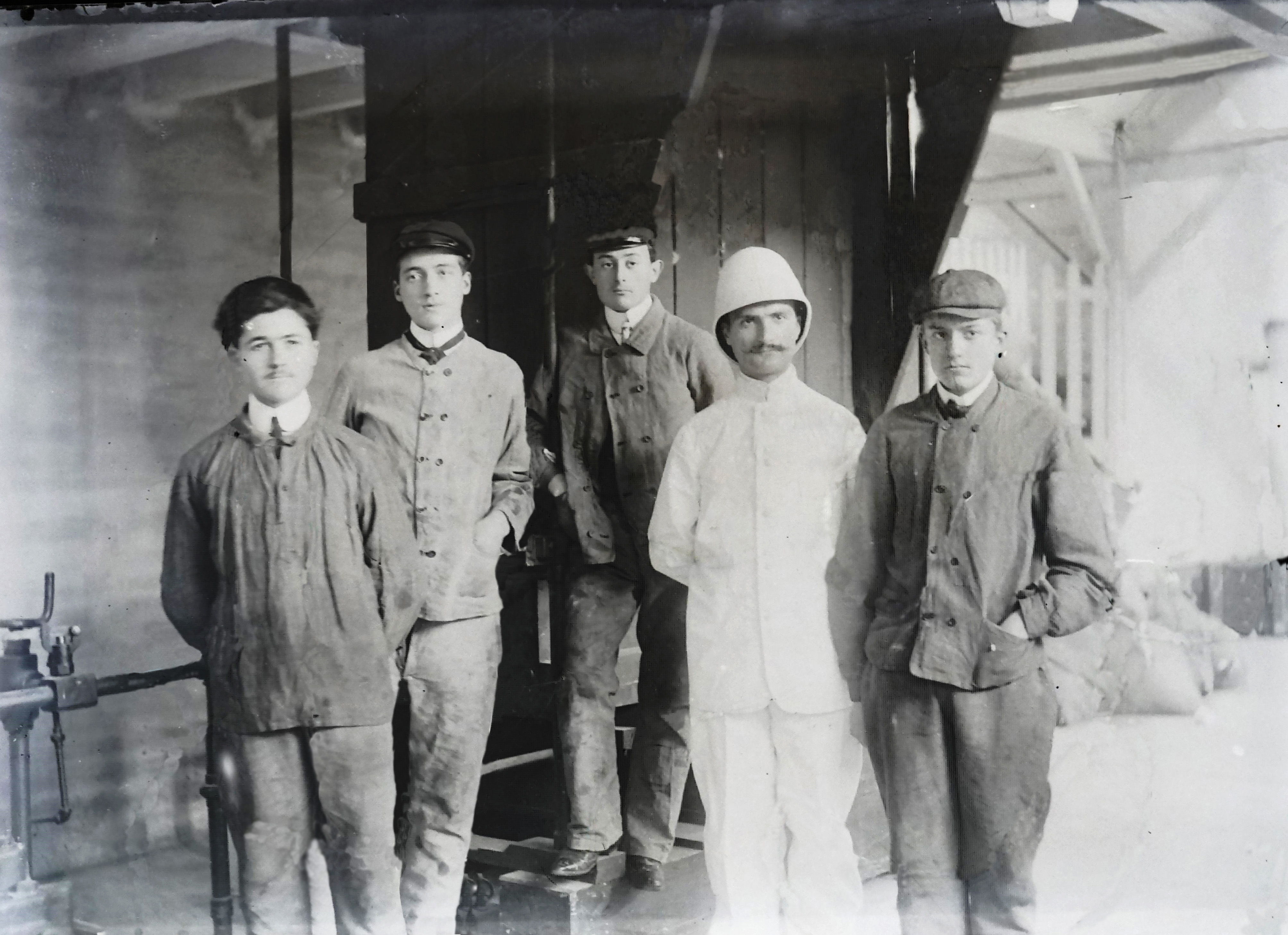 photo d'étudiant avec professeur d'étude colonial